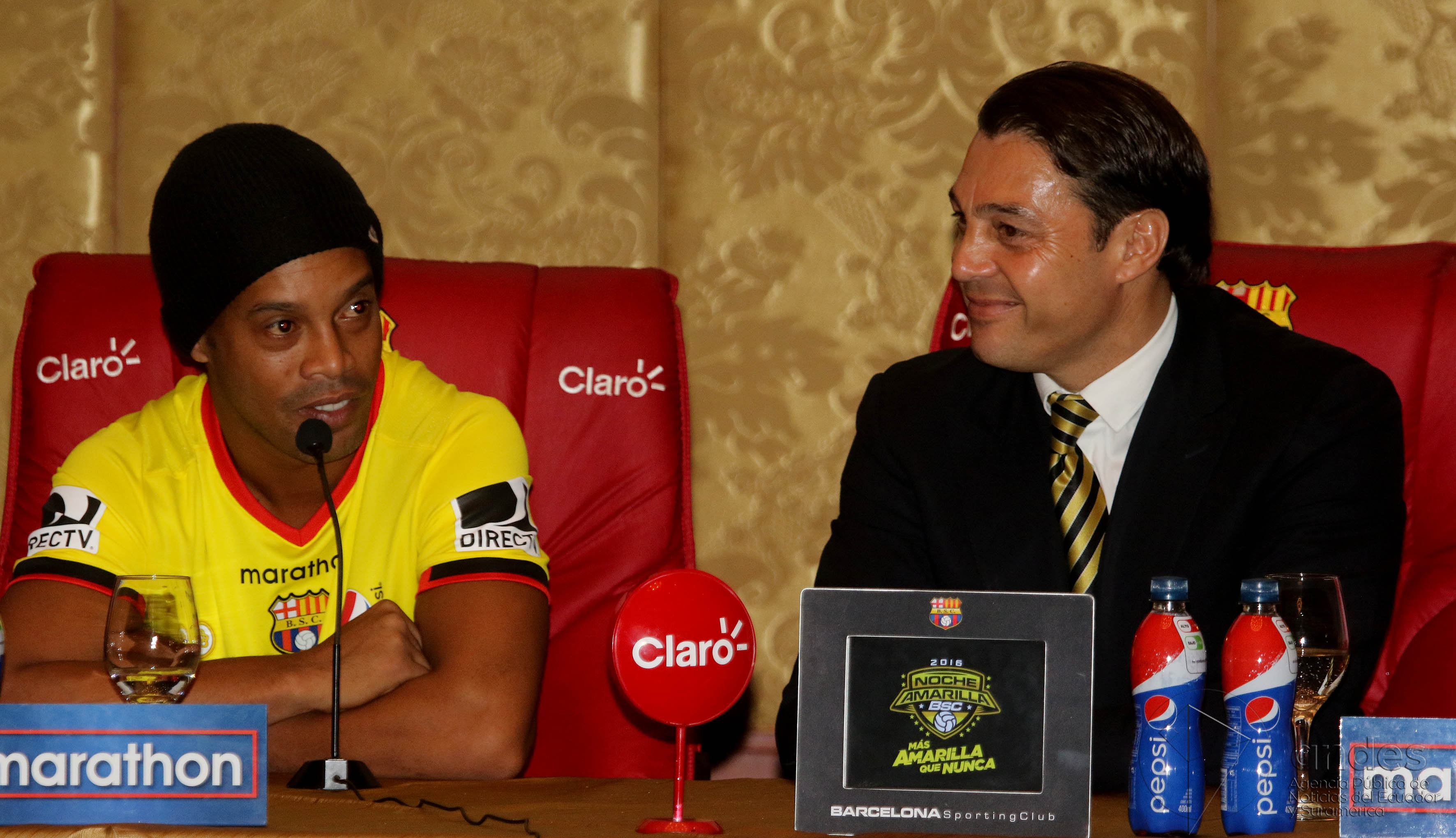 Guayaquil, viernes 29 de enero del 2016 (Andes).-Durante la presentación de la camiseta oficial para la temporada 2016, el crack brasileño Ronaldinho Gaúcho compartió unos minutos con la prensa y habló sobre su participación en la noche amarilla. En la foto lo acompaña el vicepresidente de Barcelona, Carlos Alejandro Alfaro MorenoFoto:Andes/César Muñoz